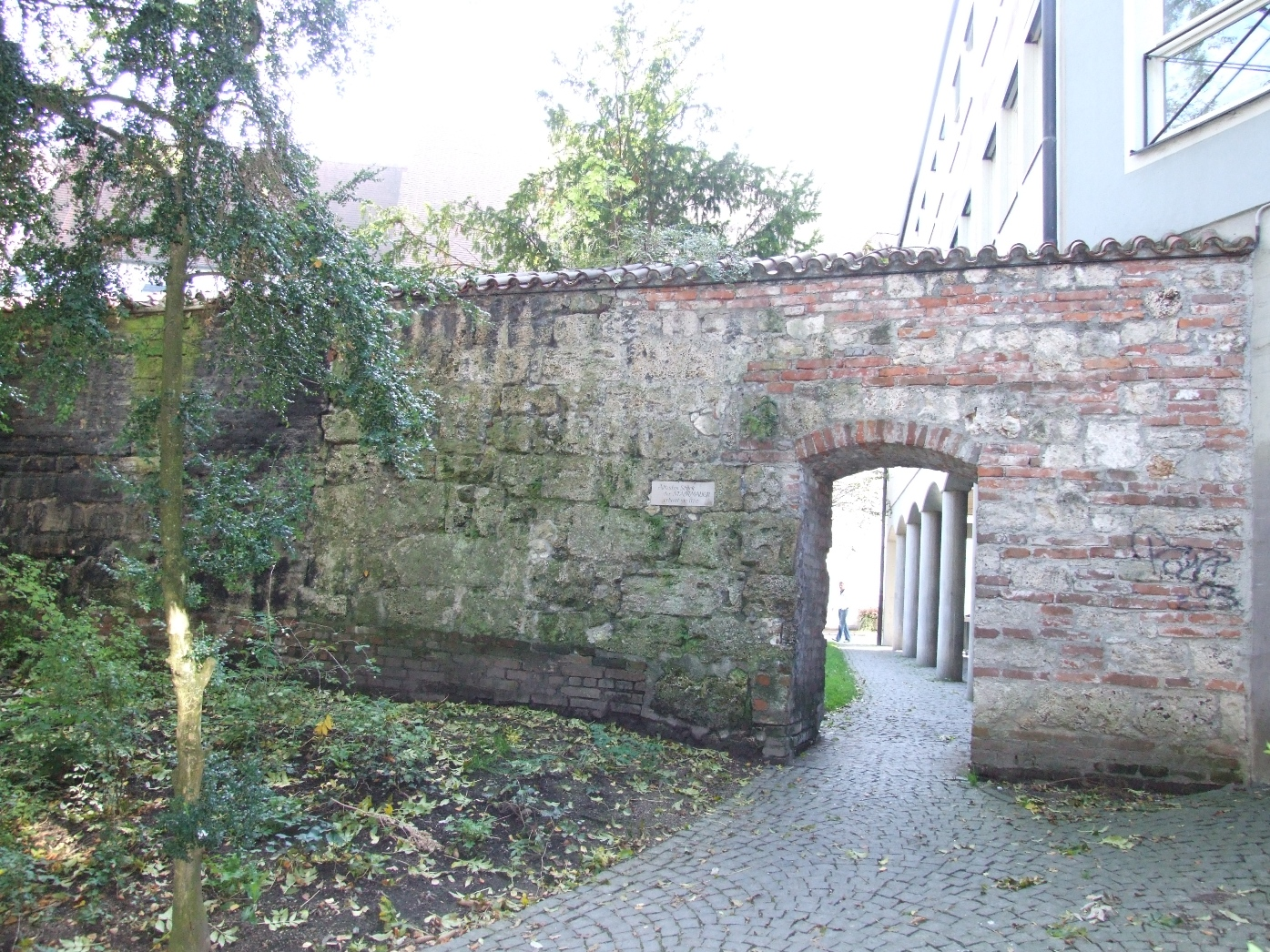 Ältestes Stück der um 1100 - 1180 erbauten Stadtmauer